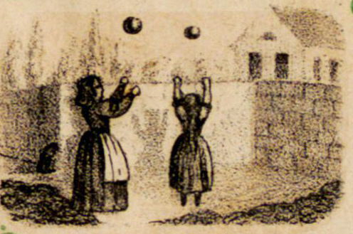 Illustration zu: Der kleine Kinderfreund : mit 76 Bildern in Tondruck. H. Müller-Schmid, Glarus (Schweiz), [1860?] 4. Das Ballspiel